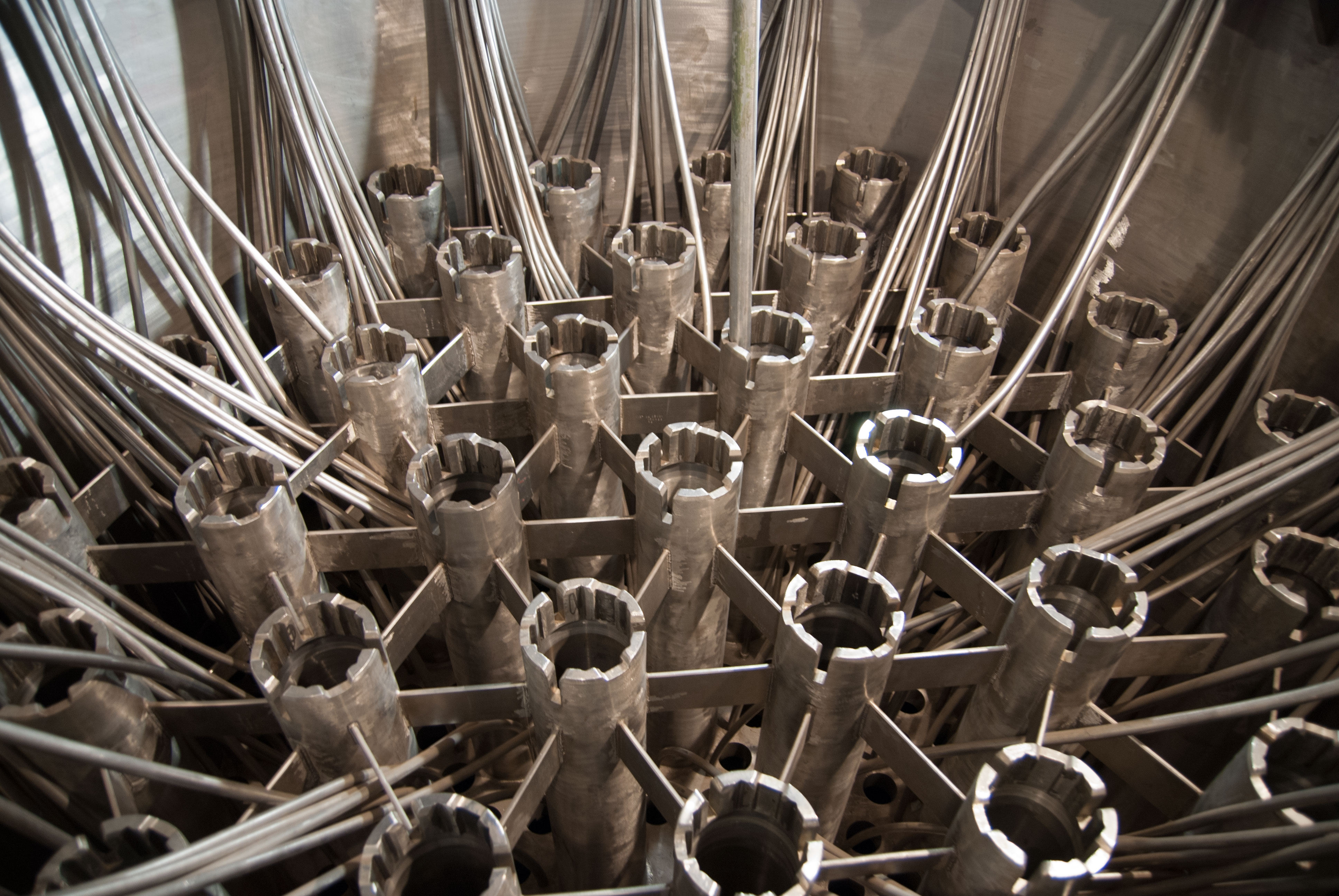 KKW Greifswald, Reaktorinneres